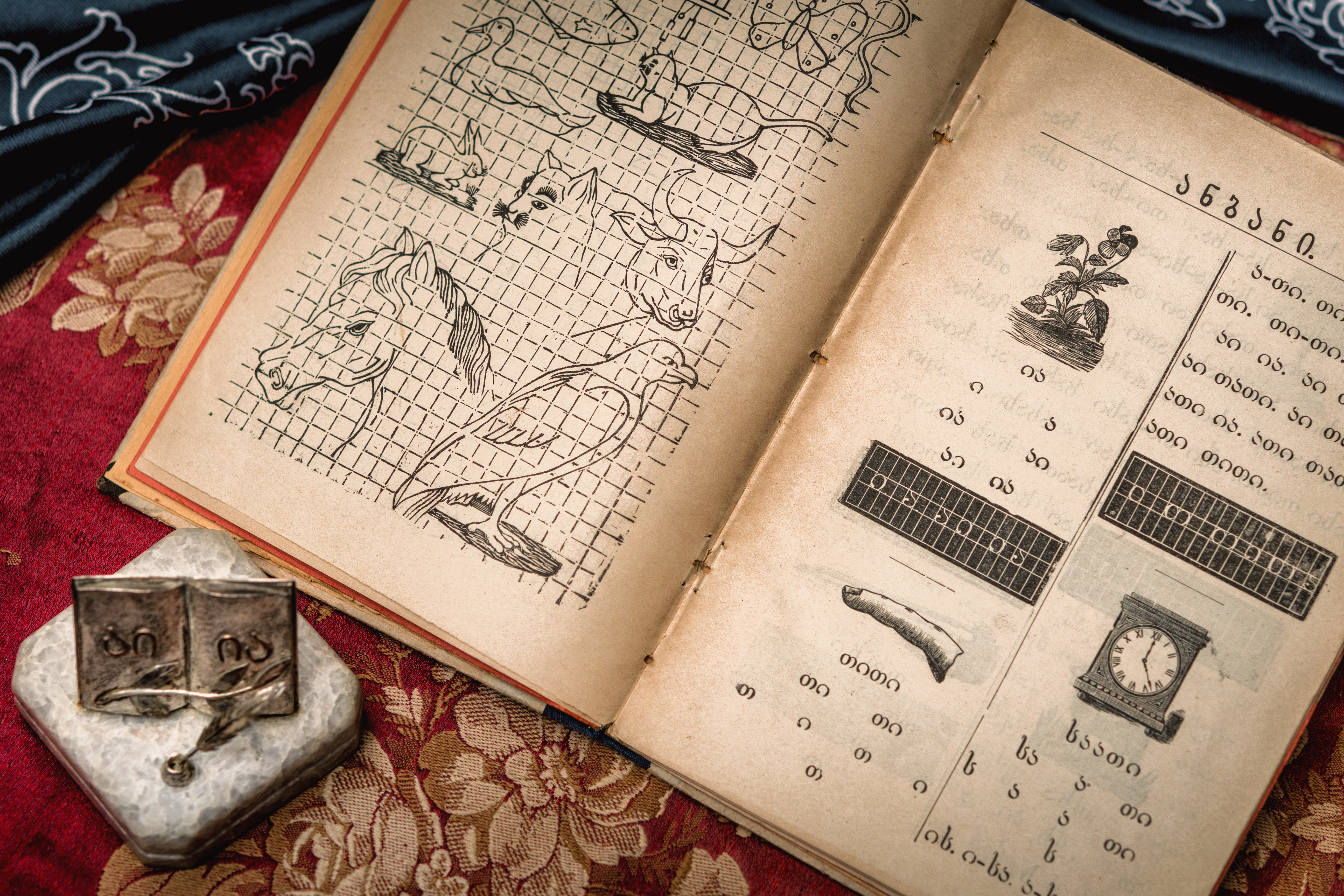 'დედა-ენა' პირველი ნაწილი. იაკობ გოგებაშვილი. 1906 წ.